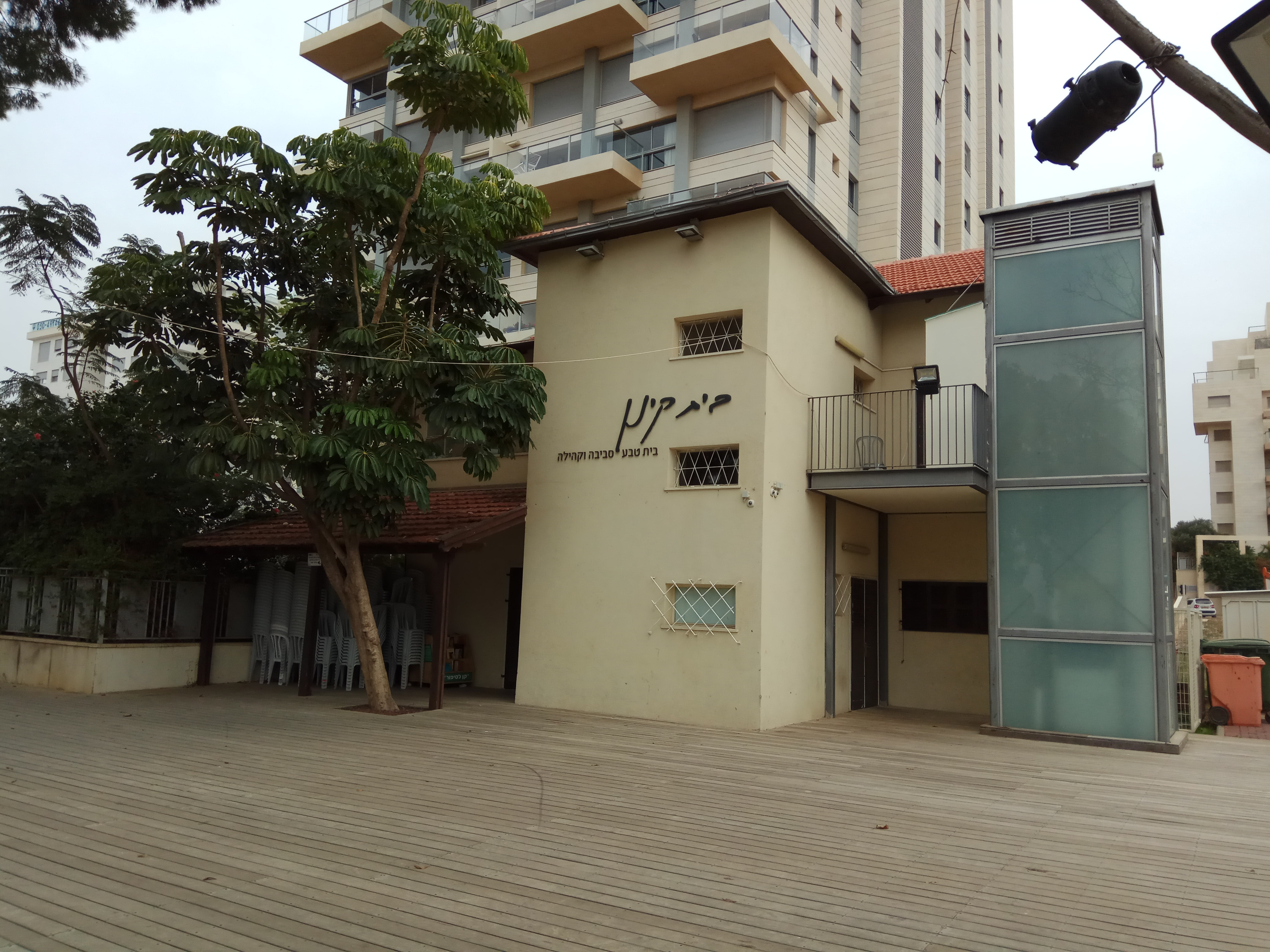 בית קינן בפארק הרצליה